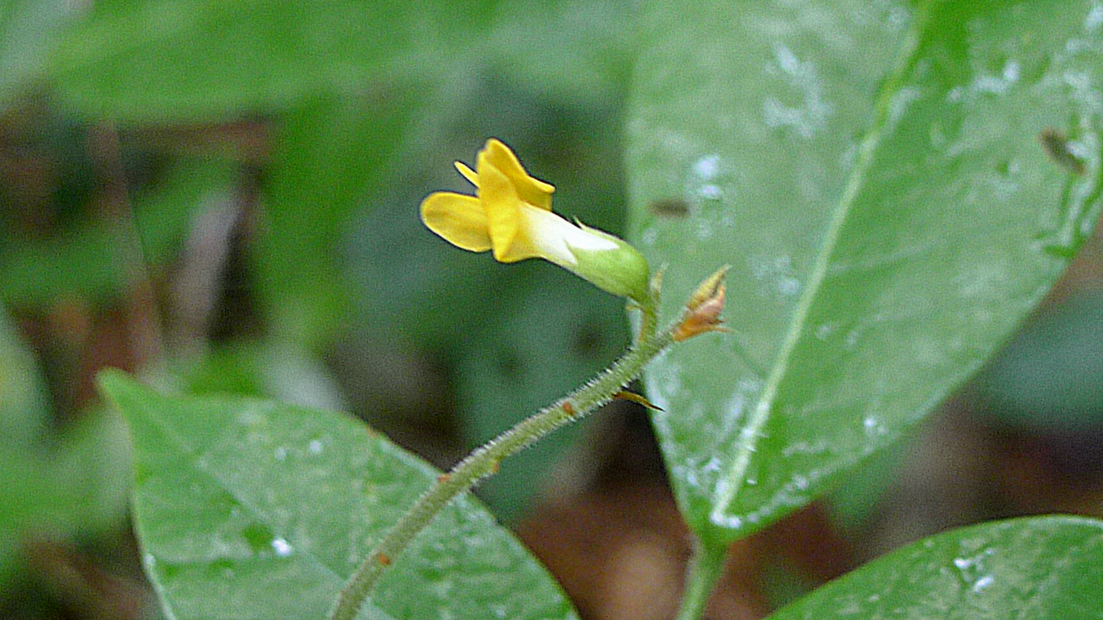 Cranocarpus mezii Taub.